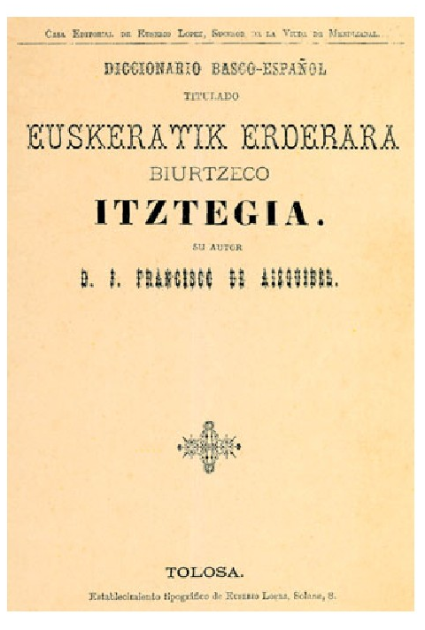 Tolosan 1885ean argitara eman zen José Francisco Aizkibelen "Diccionario Basco-Español titulado Euskeratik Erderara biurtzeko Iztegia"ren lehen argitalpenaren azala